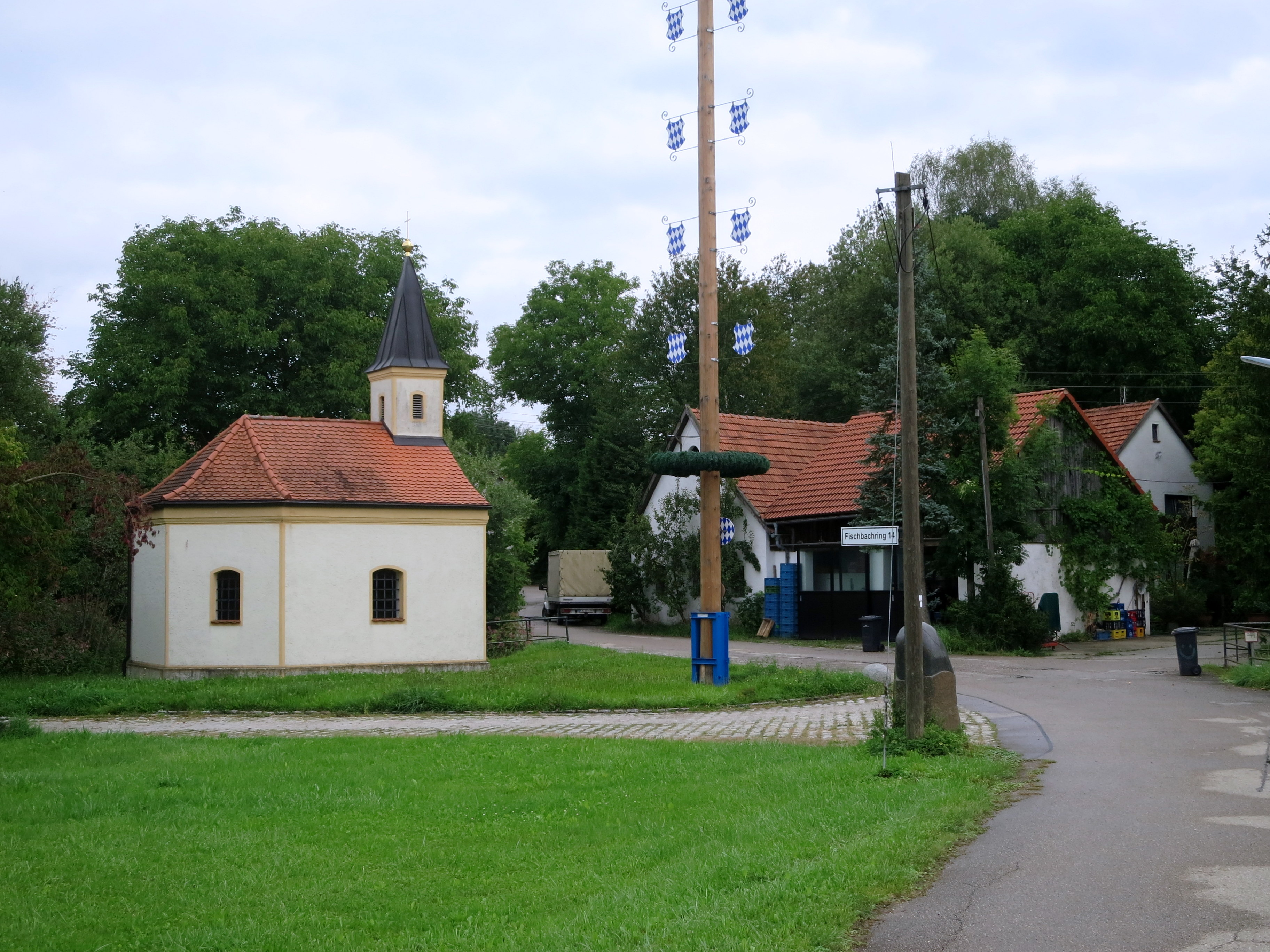 Die Ortskapelle neben dem Maibaum